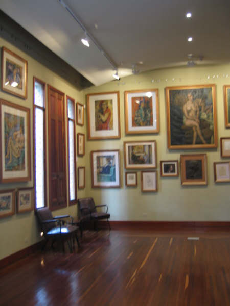 Casa Museo Maestro Pedro Nel Gómez. Medellín, Colombia.